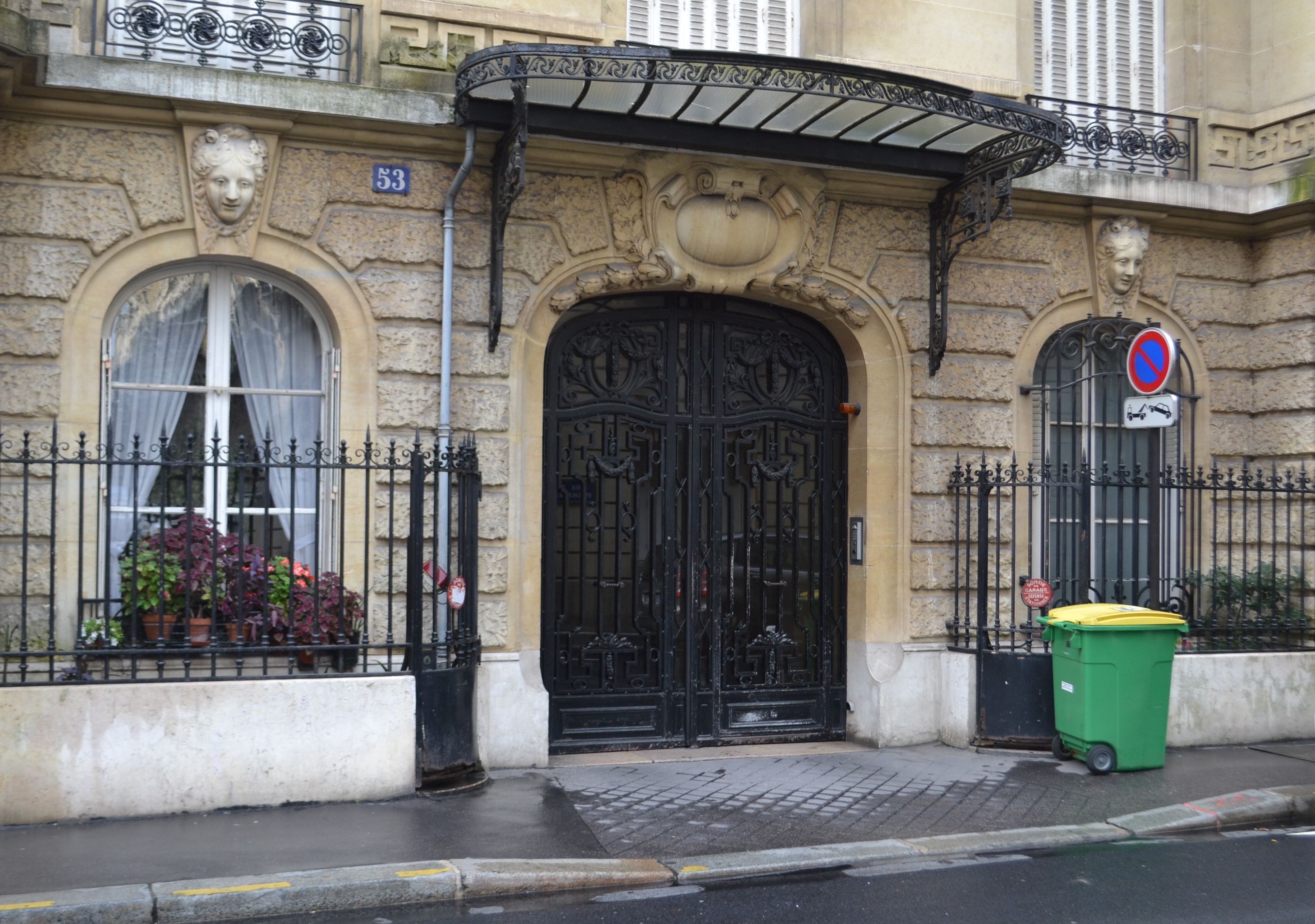 Entrée du 53 rue Pergolèse, Paris 16e.